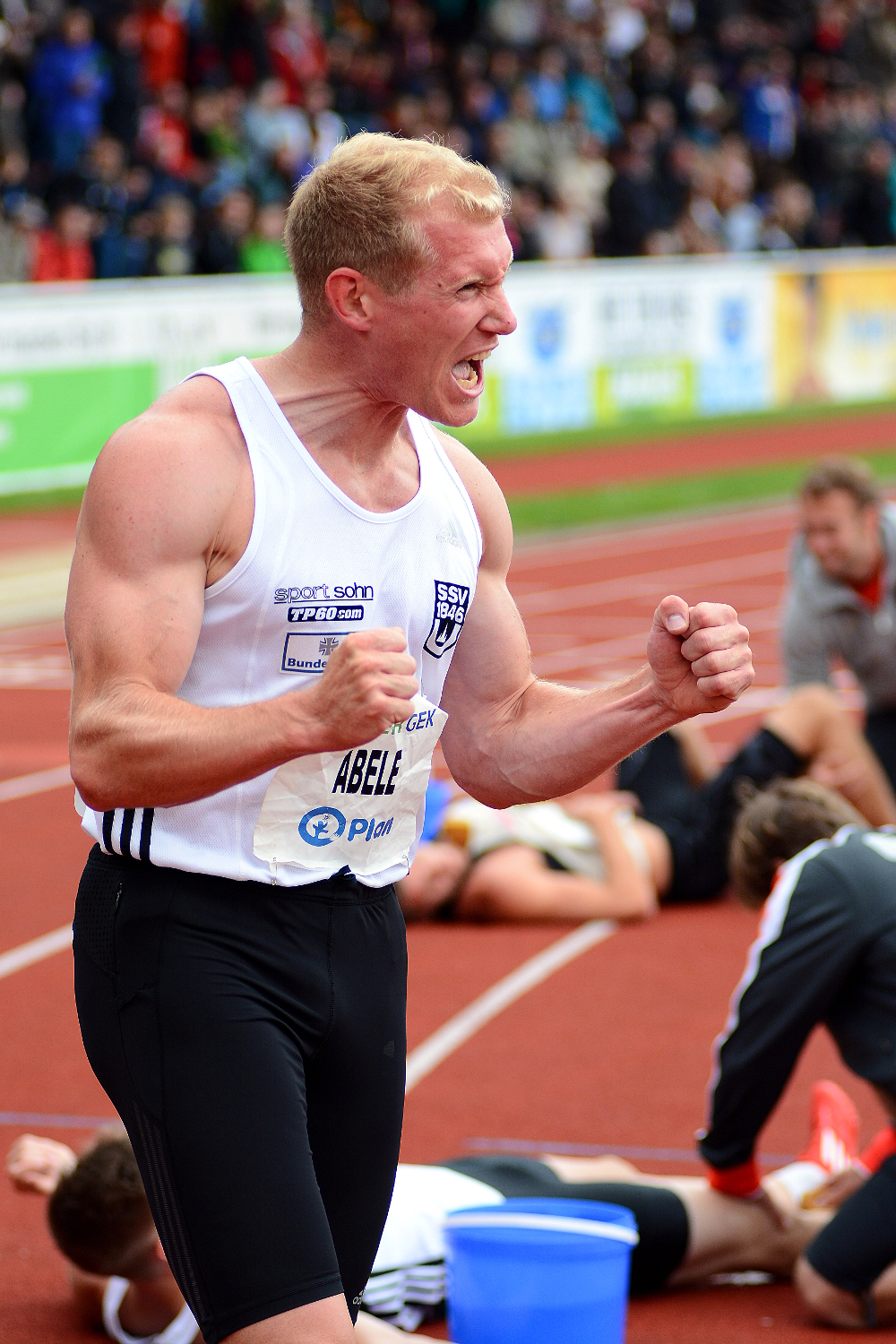 Mehrkampf-Meeting Ratingen 2014 – Arthur Abele 1500m Lauf